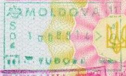 Passport exit stamp from Tudora, Moldova-Ukraine border